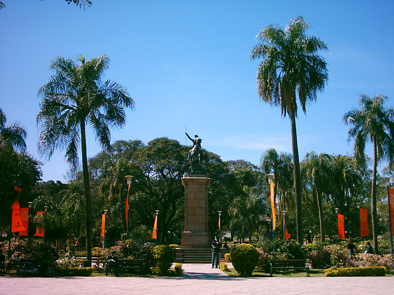 Estatua ecuestre del general José de San Martín en la plaza 25 de mayo en Resistencia (Chaco)